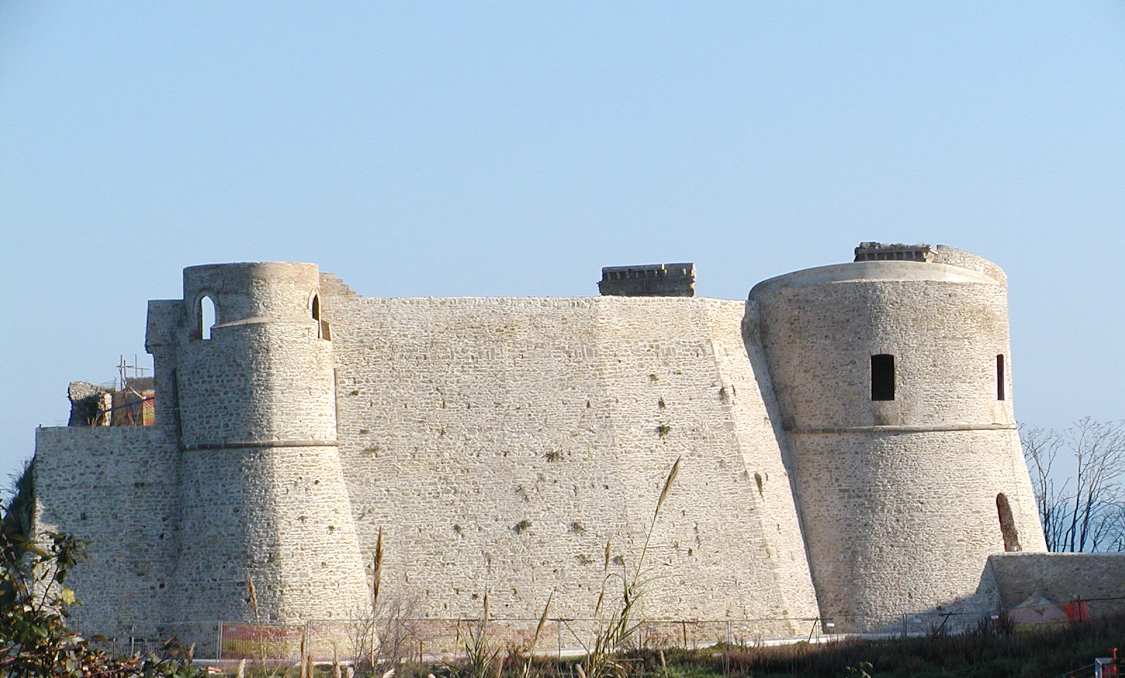 Die Burgruine von Süden